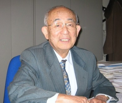 Akira Koudate